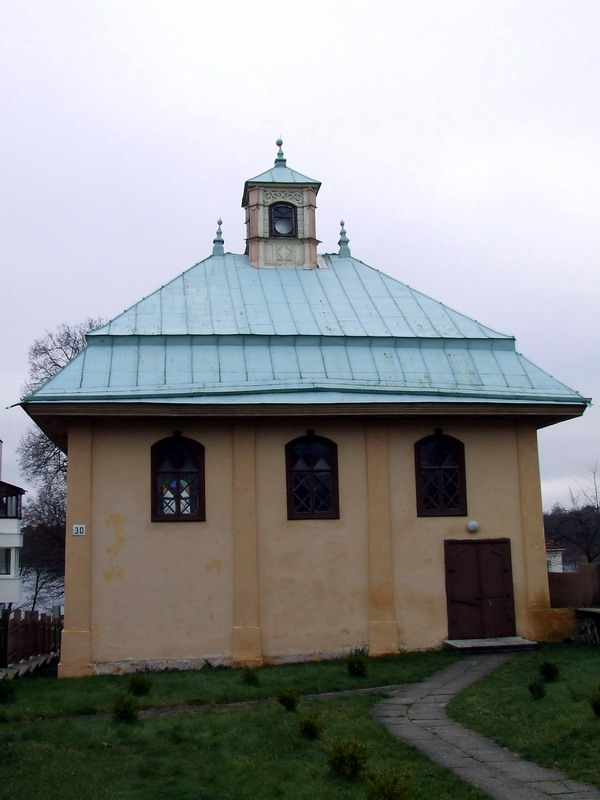 Karaite kenesa in Trakai, Lithuania